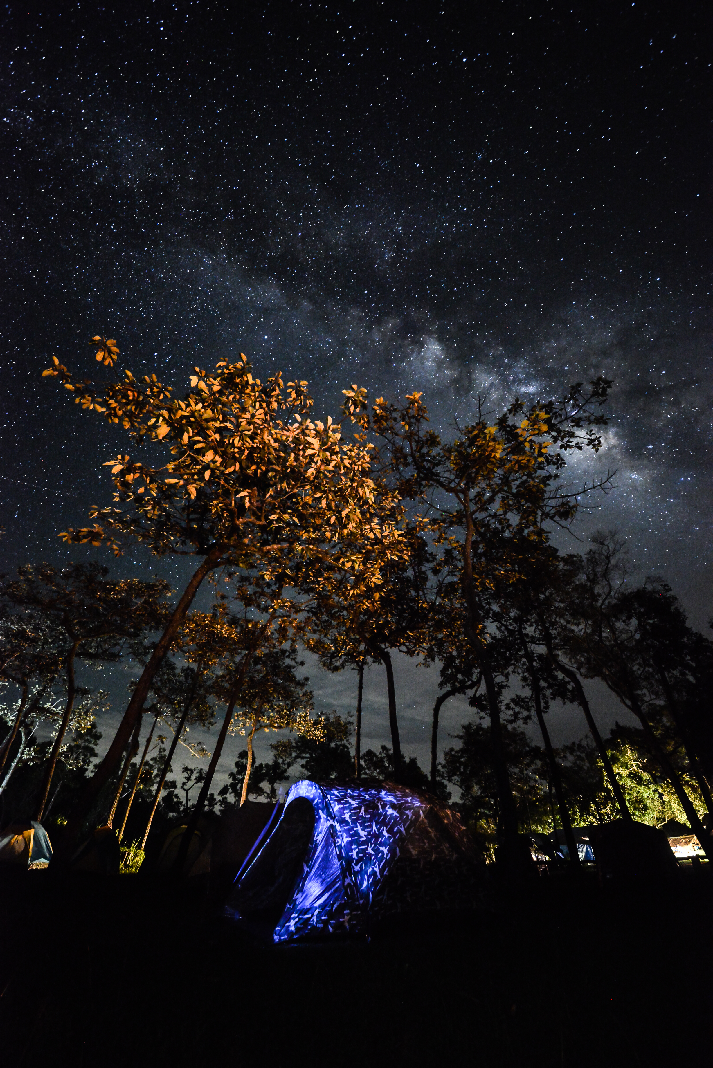 ลานกางเต้นท์ อุทยานแห่งชาติไทรทอง จ.ชัยภูมิ